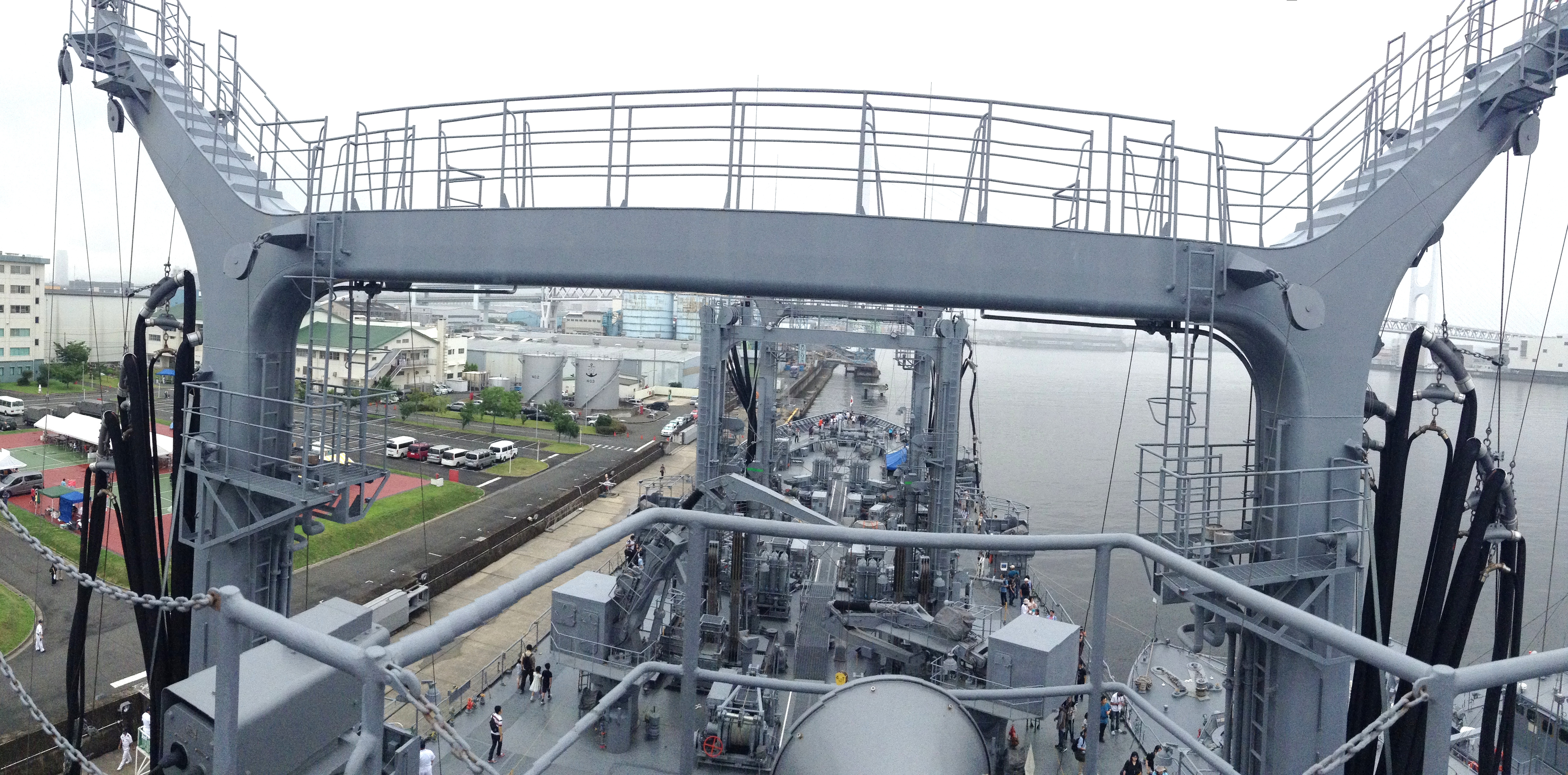 海上自衛隊 補給艦「ときわ」 艦橋上より